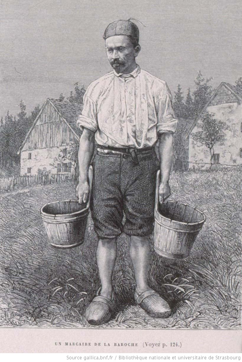 Marcaire de la Baroche